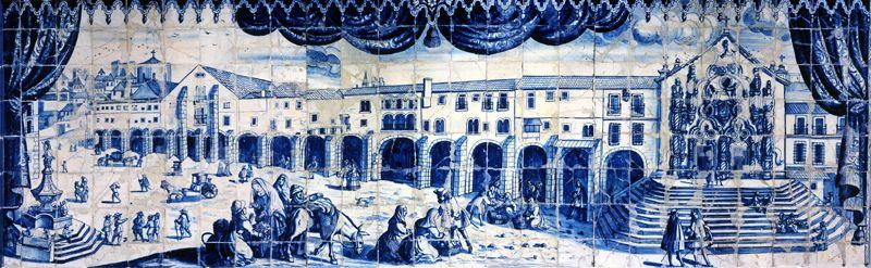 Painel de azulejos de oficina de Lisboa, da 1ª metade do século XVIII existente no Museu da Cidade, Lisboa, onde no primeiro plano aparecem tipos populares a comercializam bens de consumo e, no lado esquerdo é representado o Chafariz de Neptuno, equiparado ao dedicado a Apolo, existente no Terreiro do Paço. O Hospital Real de Todos-os-Santos tinha fachada virada para o Rossio e fora mandado erigir por D. João II em 1492, mas a sua construção só terminou no reinado de D. Manuel I, nos primeiros anos do século seguinte. Edifício de vanguarda na época, acolheu os primeiros internamentos em 1502, com regimento e estatuto de Escola de Medicina e o número de enfermarias foi crescendo ao longo do tempo: 3 (1504), 16 (1520) e 25 (1715). O Hospital Real de Todos-os-Santos foi desactivado na sequência do Terramoto de 1755, ocorrido a 1 de Novembro desse ano, o qual foi responsável pela destruição quase completa da cidade de Lisboa e foi substituído depois pelo Hospital Real de São José, no que restou do colégio de Santo Antão da Companhia de Jesus.(Rui Carita)